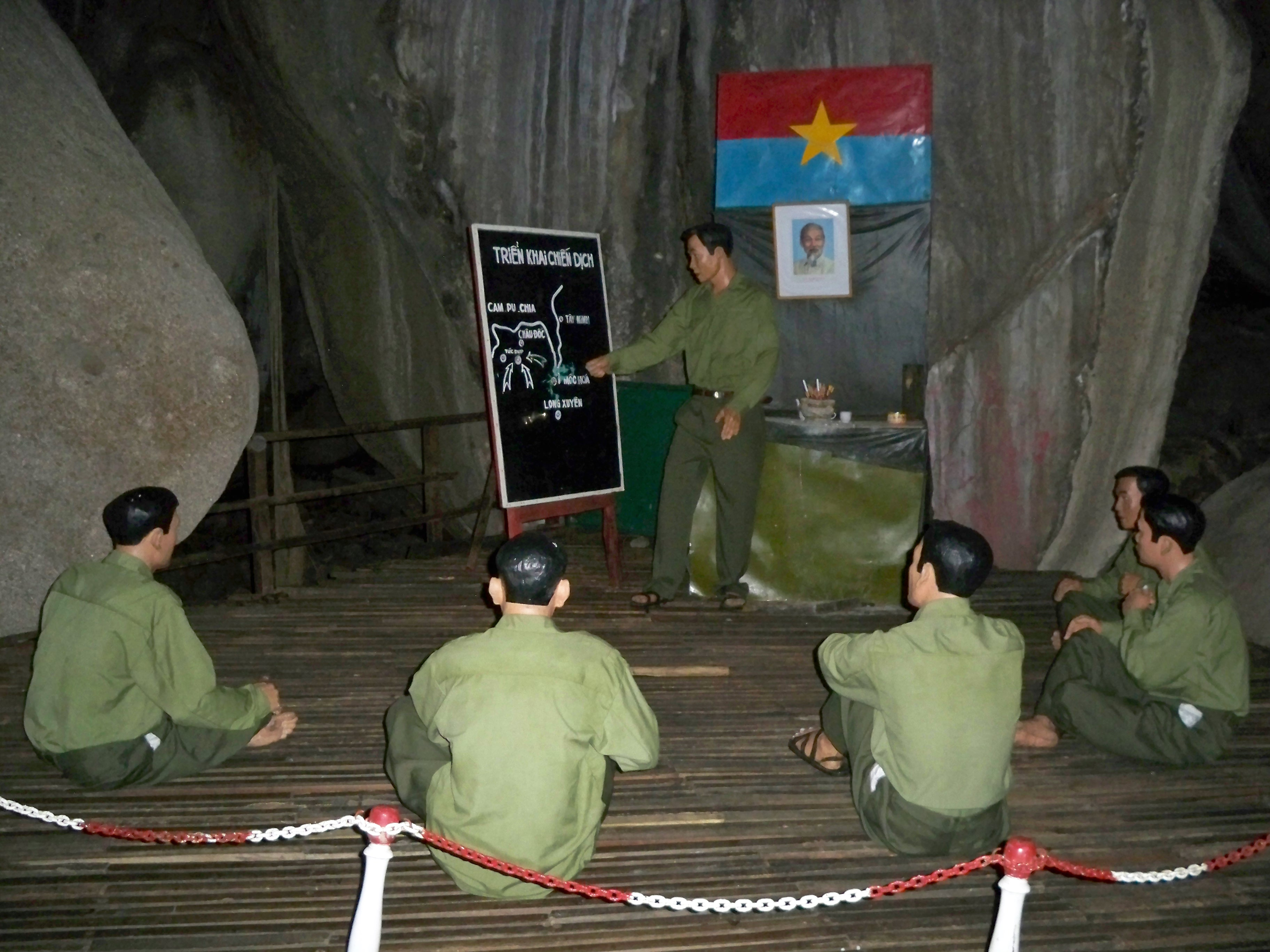 Đồi Tức Dụp